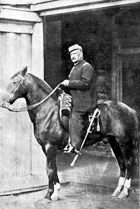 Manuel Baquedano, General en Jefe del Ejército Chileno, fotografía tomada en Tacna después de la victoria de Arica. Baquedano viste su uniforme que usó durante toda la campaña y monta a su caballo de batalla "Diamante"